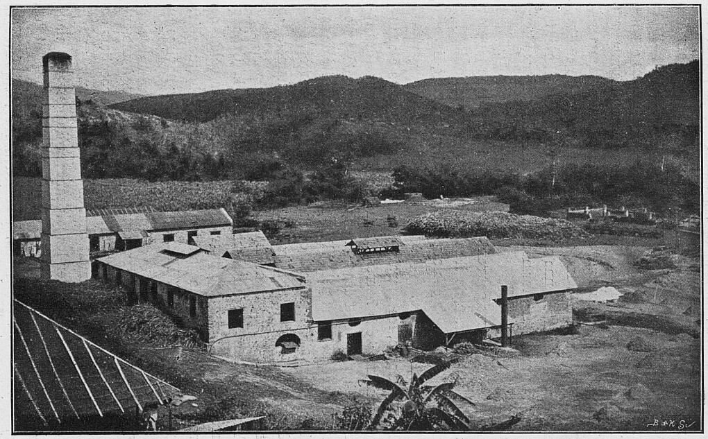 Émile Vienne, Notice sur Mayotte et les Comores (Alcan-Lévy, 1900), page 81